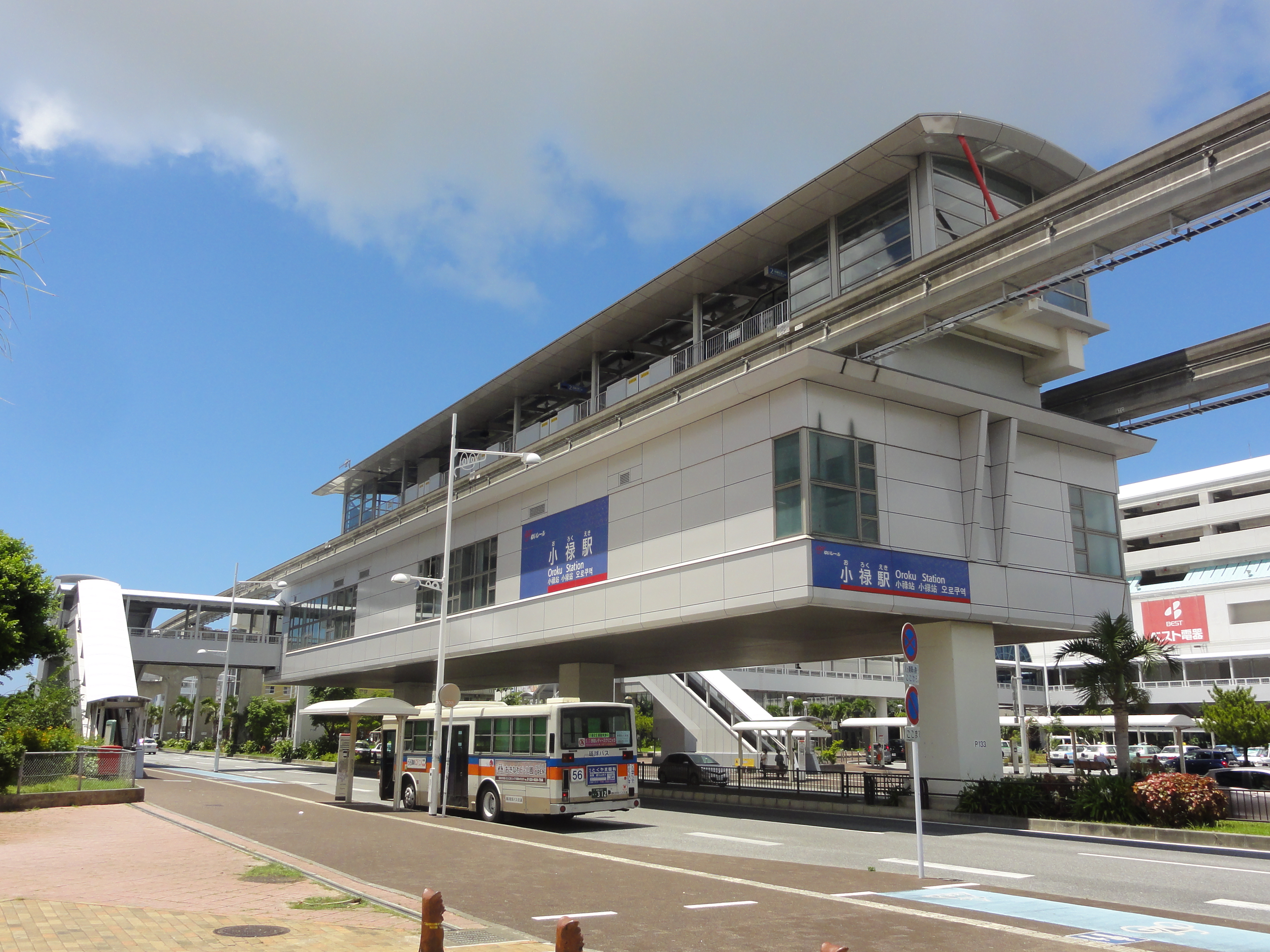 沖縄都市モノレール 小禄駅